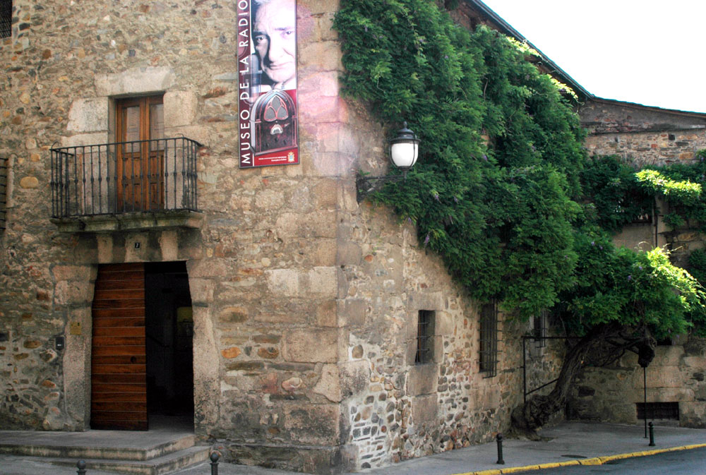 Museo de la Radio. Ponferrada, León, España. Foto por Alejandro Bolado